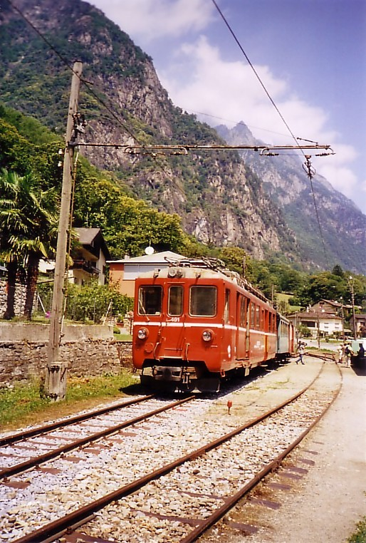 Triebwagen BDe 4/4 491, der Ferrovia Mesolcinese (ehemalige Bellinzona-Mesocco-Bahn, Meterspur Adhäsionsbahn), in der Station Cama, im Juli 2006.